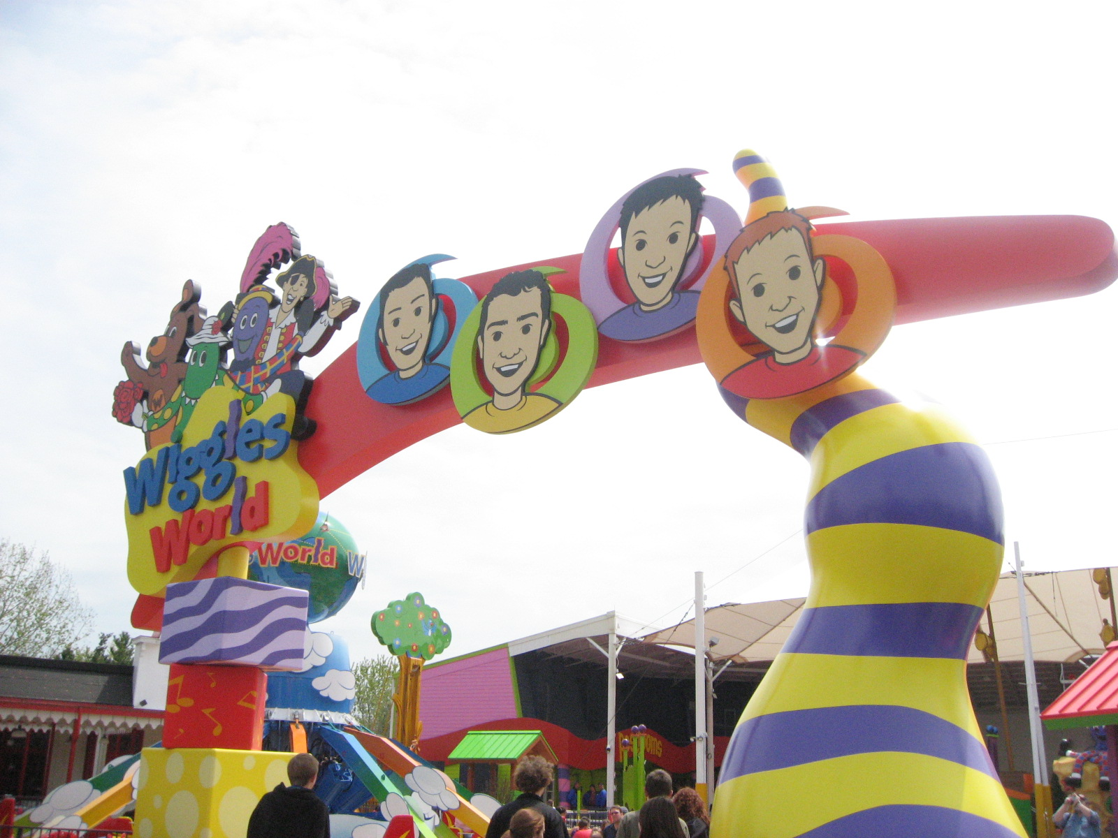 Wiggler's World (Six Flags Great America), w 2007